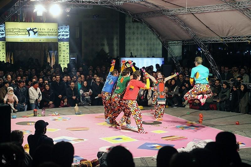 Street Performances Draw Attention in Fajr Theater Festival - TEHRAN (Tasnim) – Theater groups delivered street performances in a park near Tehran’s City Theater on Tuesday evening, during the Fajr International Theater Festival. The event would go on until January 29.